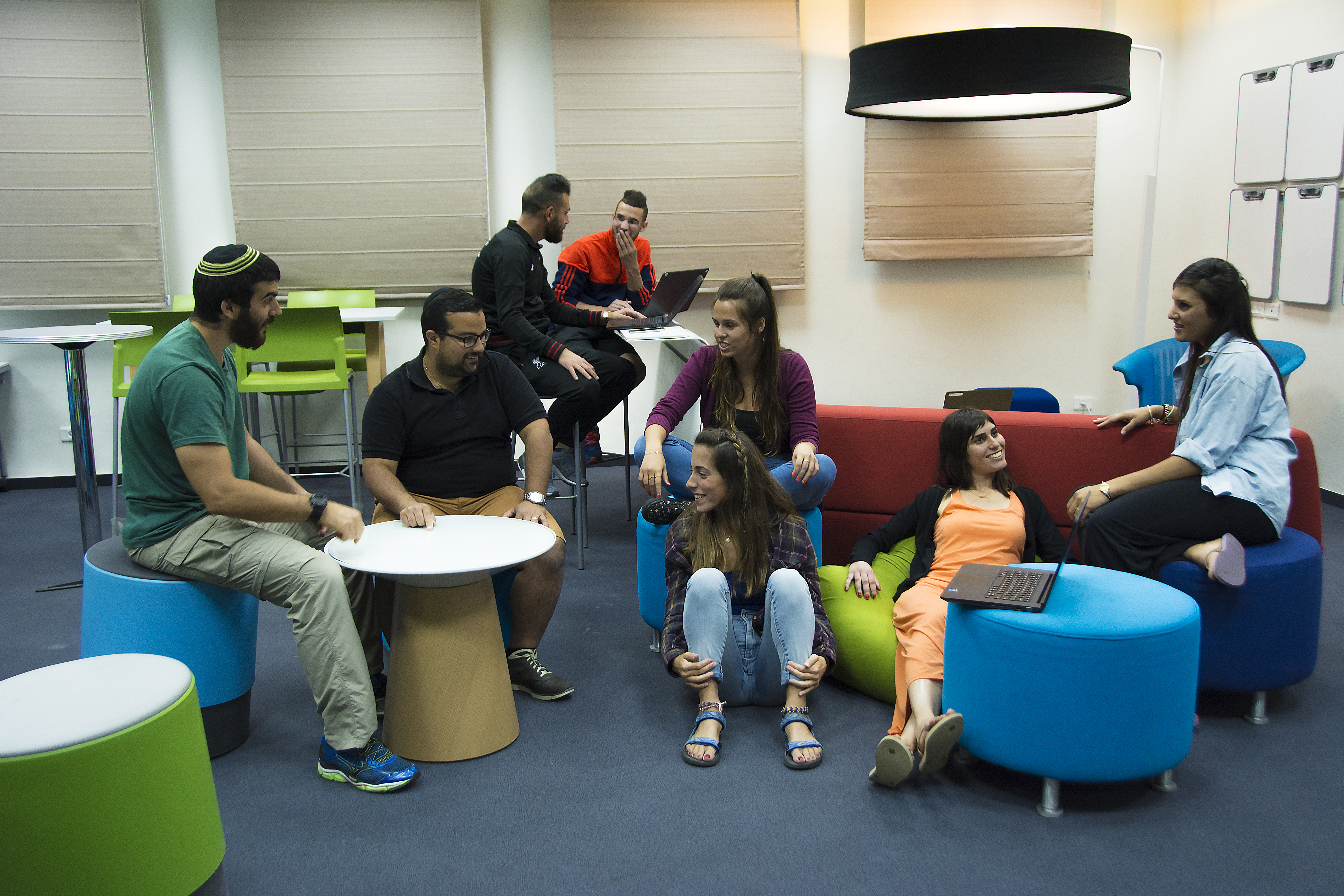 Ohalo Learning Spaces